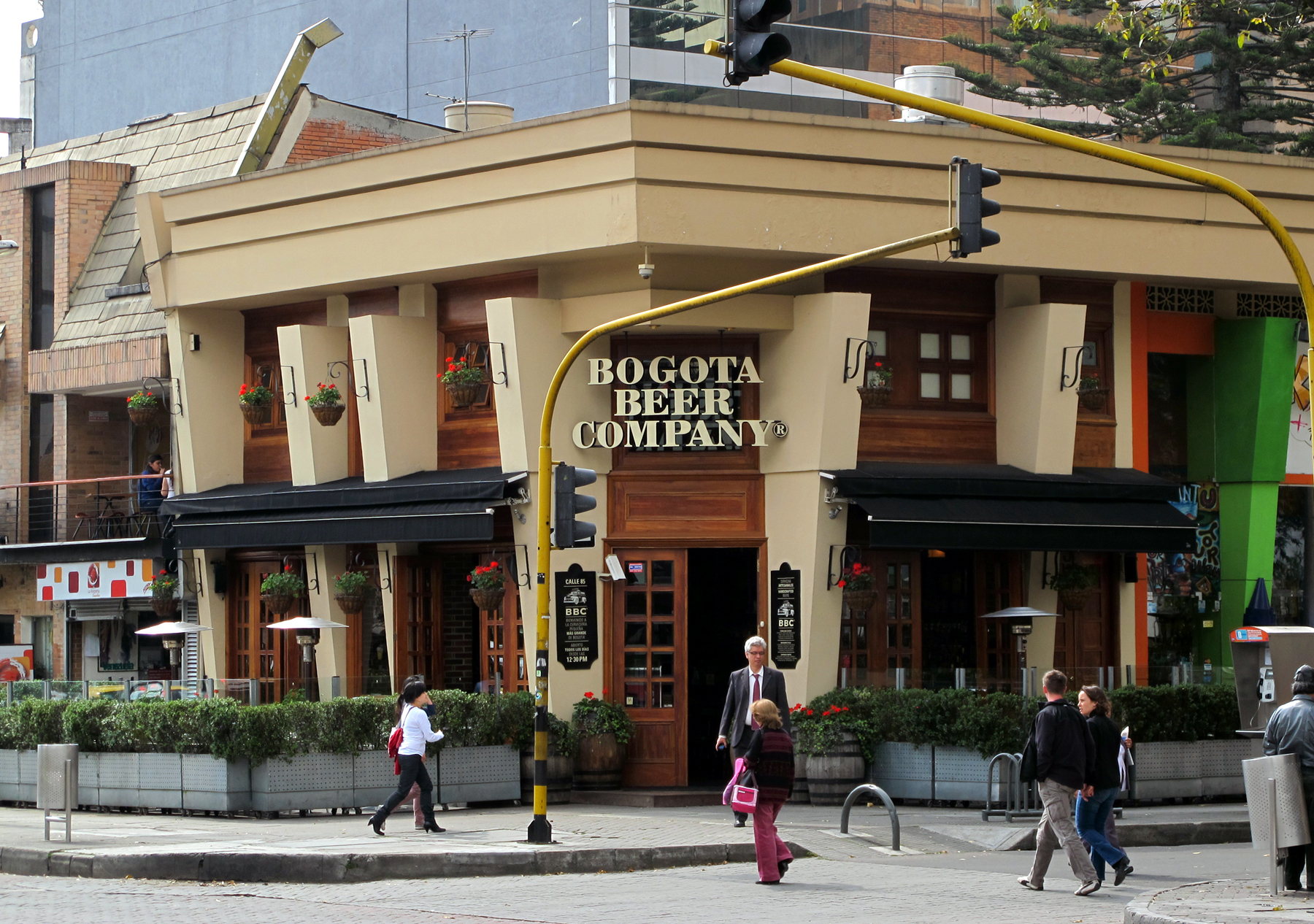 Bogotá Beer Company i Calle 85 i Zona Rosa i Bogotá